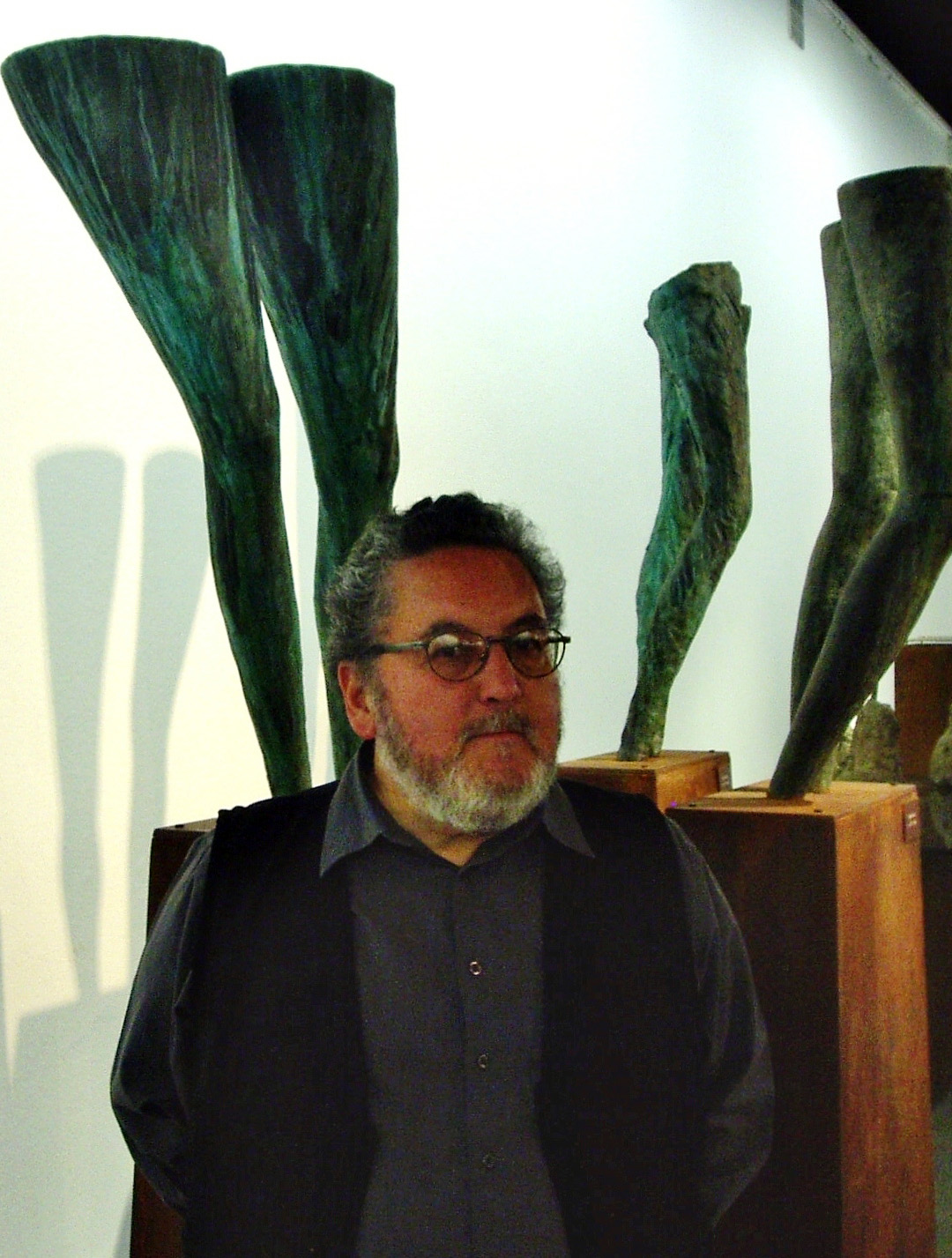 Bartolomé Leal en presentación del escultor Mario Irarrázabal.